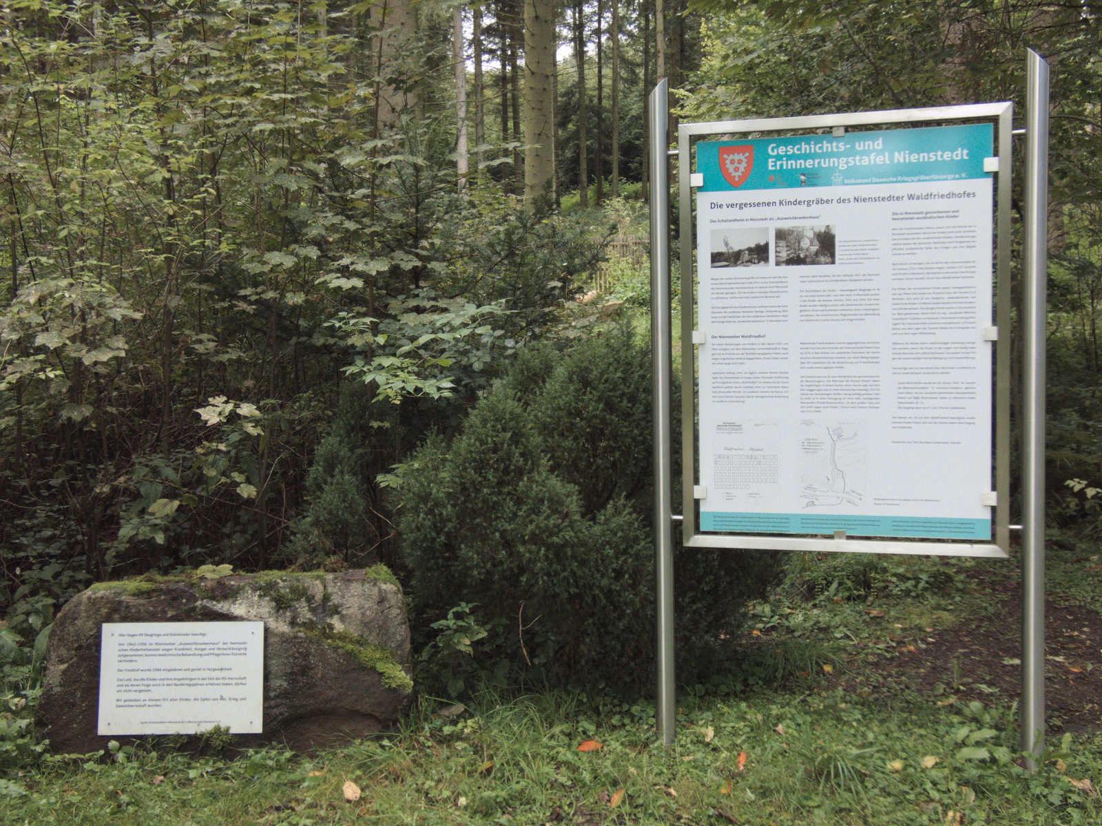 Der 2001 gesetzte Gedenkstein des Vereins Schullandheim Nienstedt der Leibnizschule Hannover und eine Erinnerungstafel am Waldweg vor dem Waldfriedhof Nienstedt in Niedersachsen